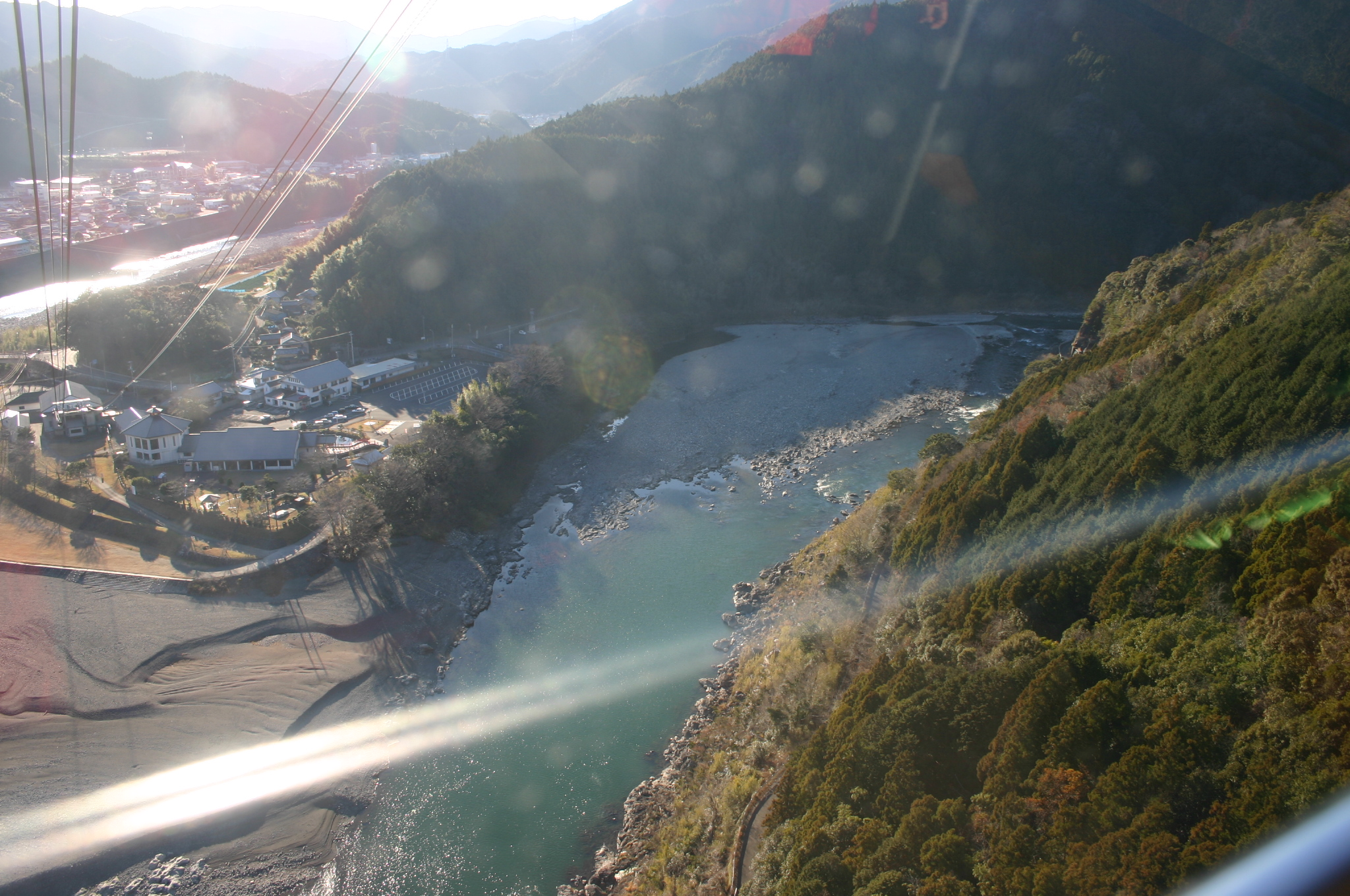 道の駅鷲の里と那珂川